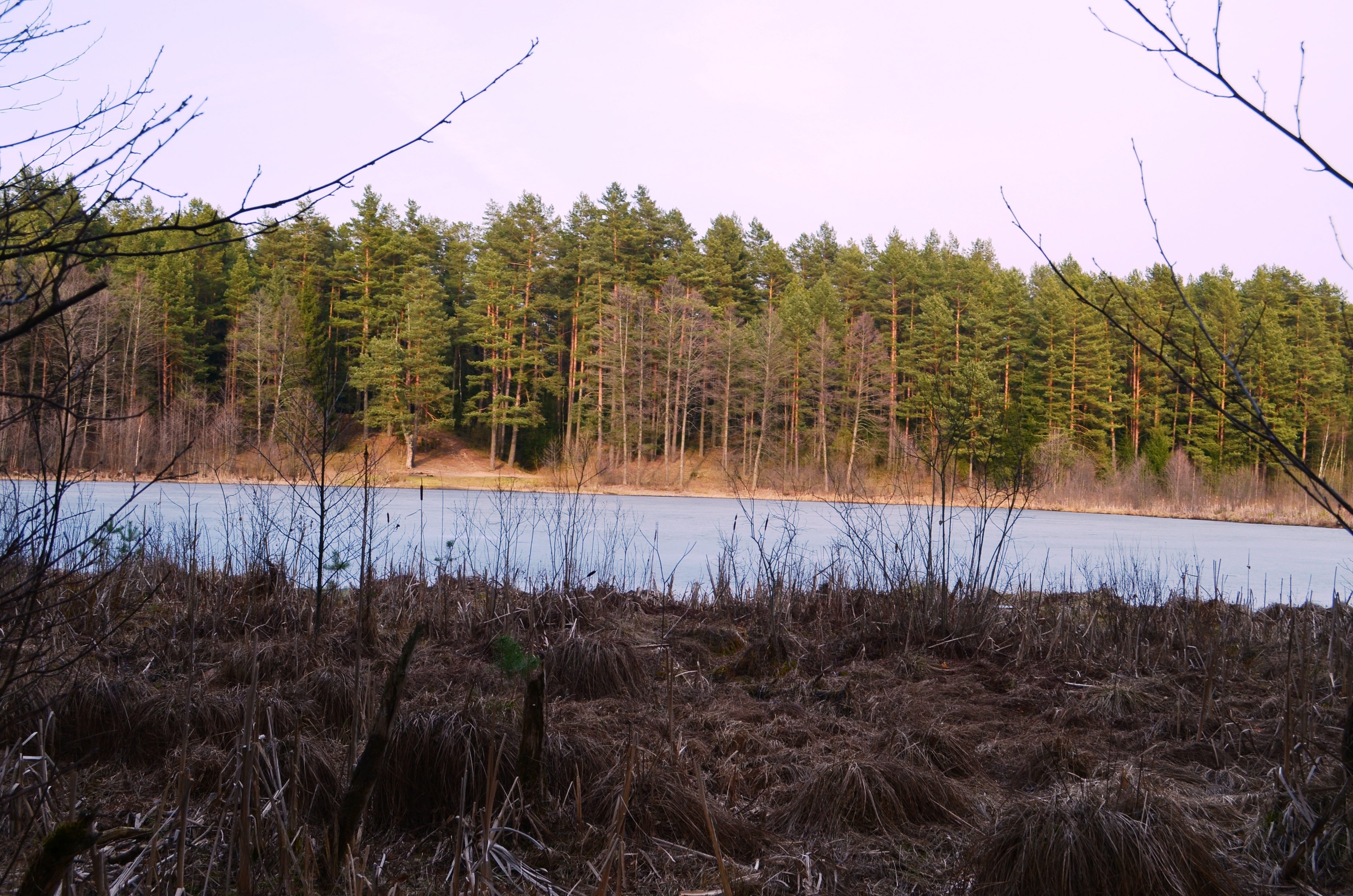 Lydekinio ežeras netoli Tapelių, Vilniaus raj.